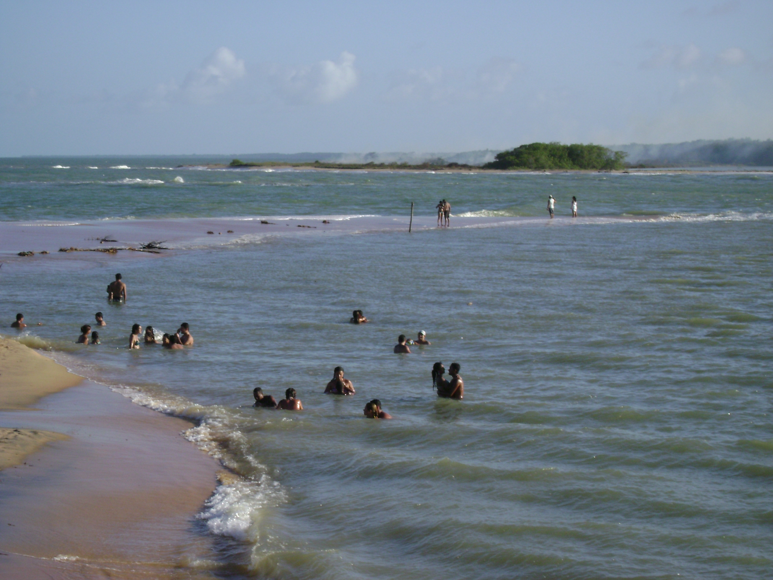 Foz do rio Itanhém, em Alcobaça, Bahia, Brasil.